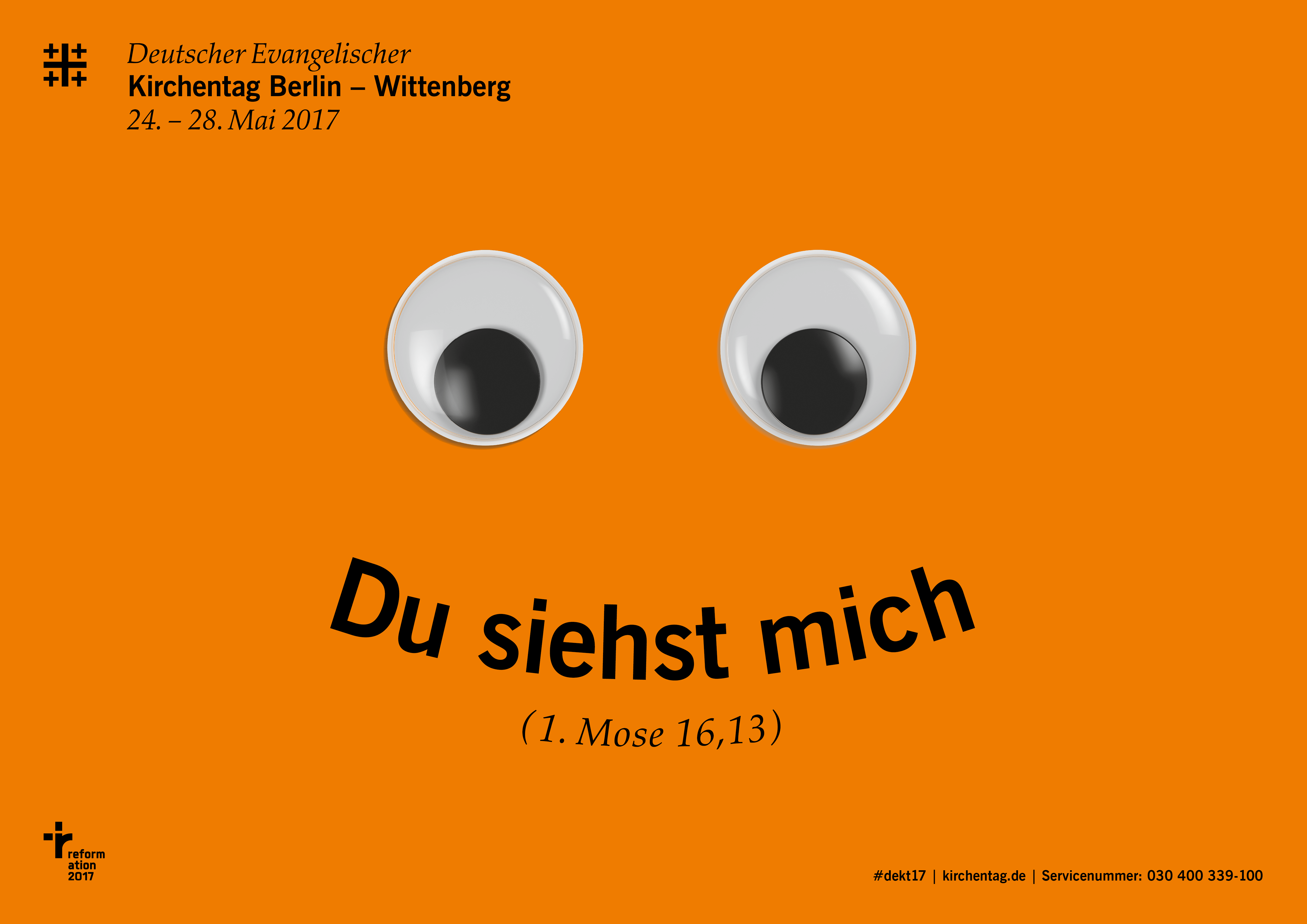 Plakat des 36. Deutschen Evangelischen Kirchentags